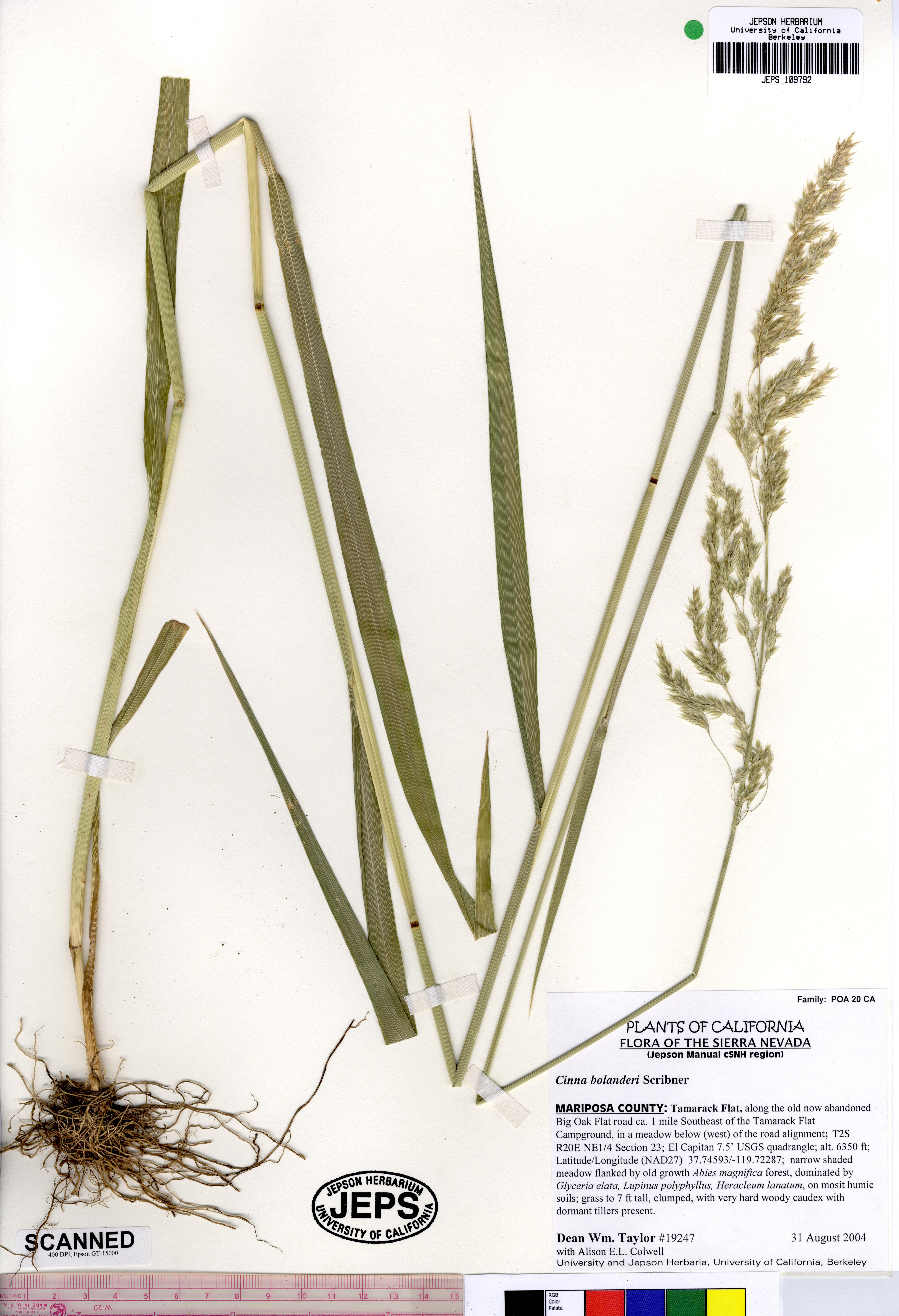 Cinna bolanderi JEPS109792